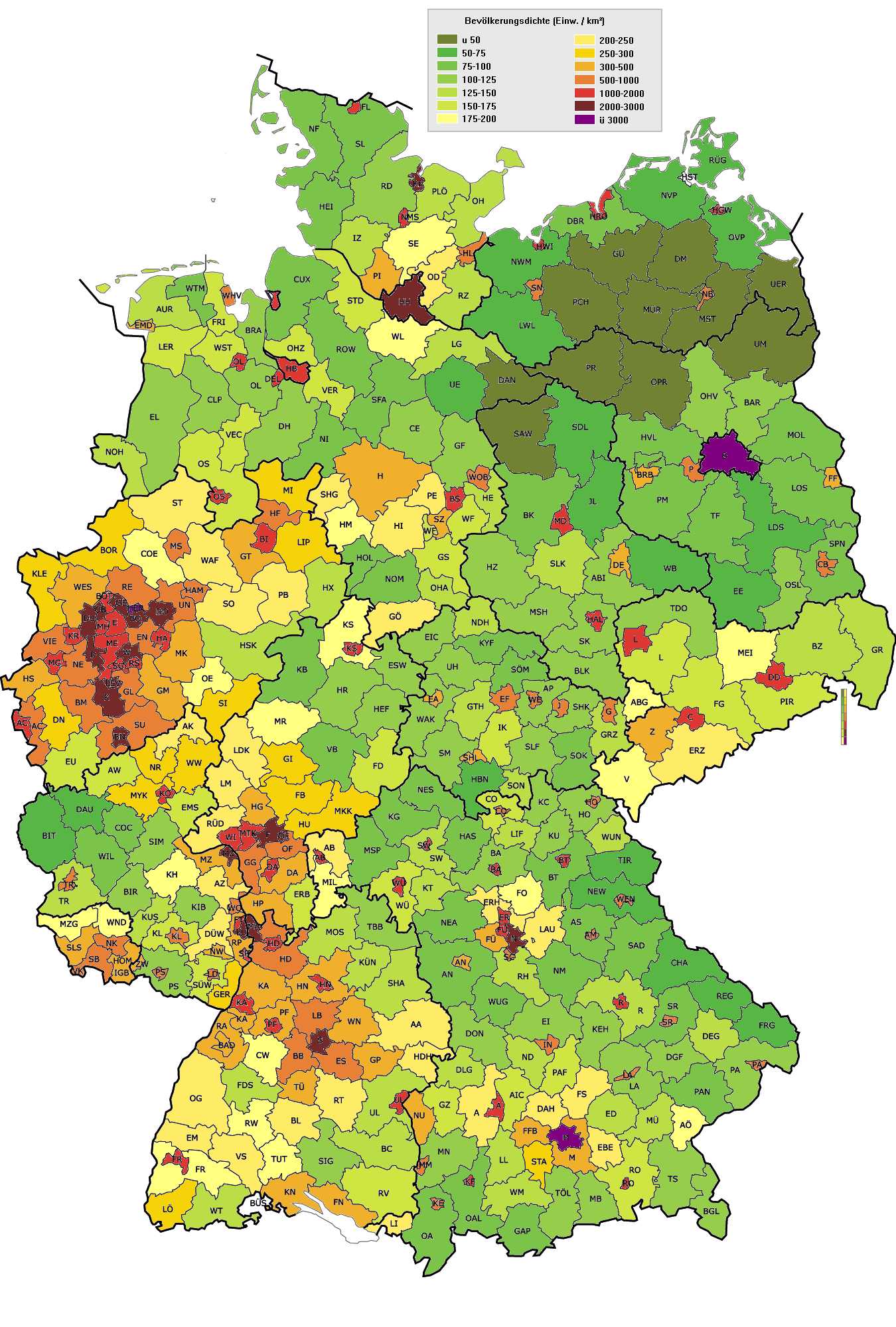 Bevölkerungsdichte Deutschlands nach Landkreisen, Stand 2010